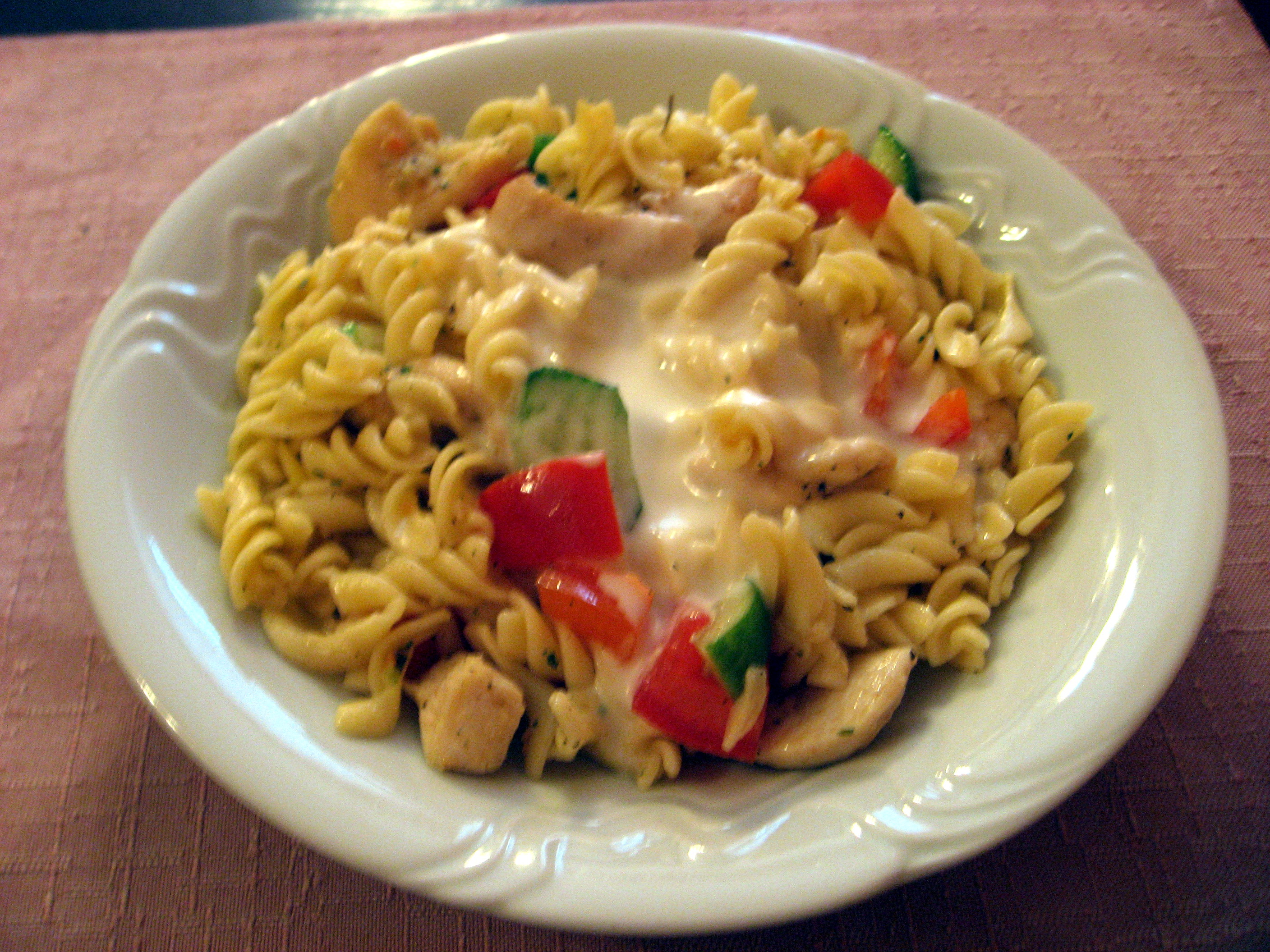 Těstovinový salát s kuřecím masem